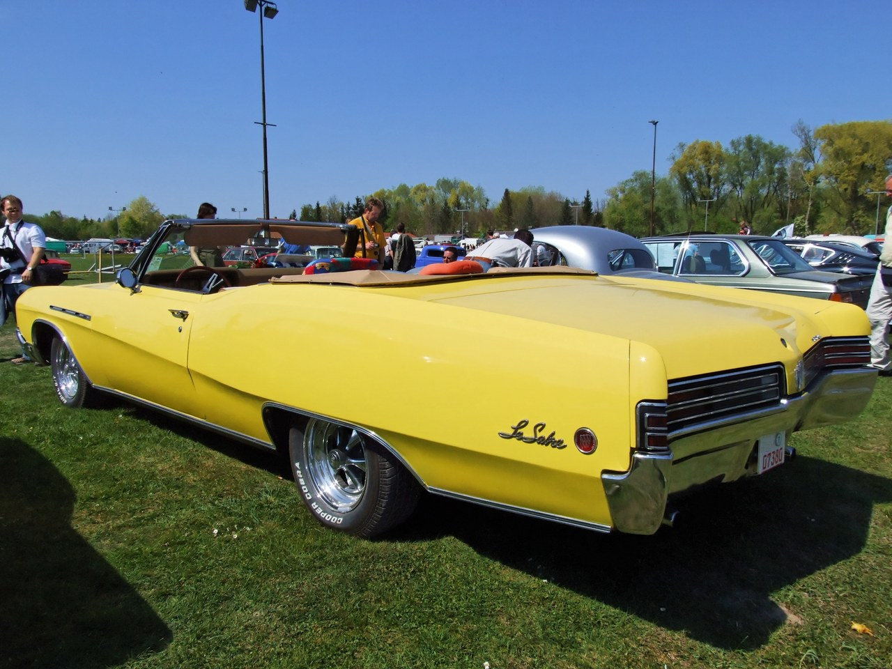 Buick LeSabre Cabriolet (1967) Quelle: selbst fotografiert, 04/2007 Fotograf: Späth Chr.